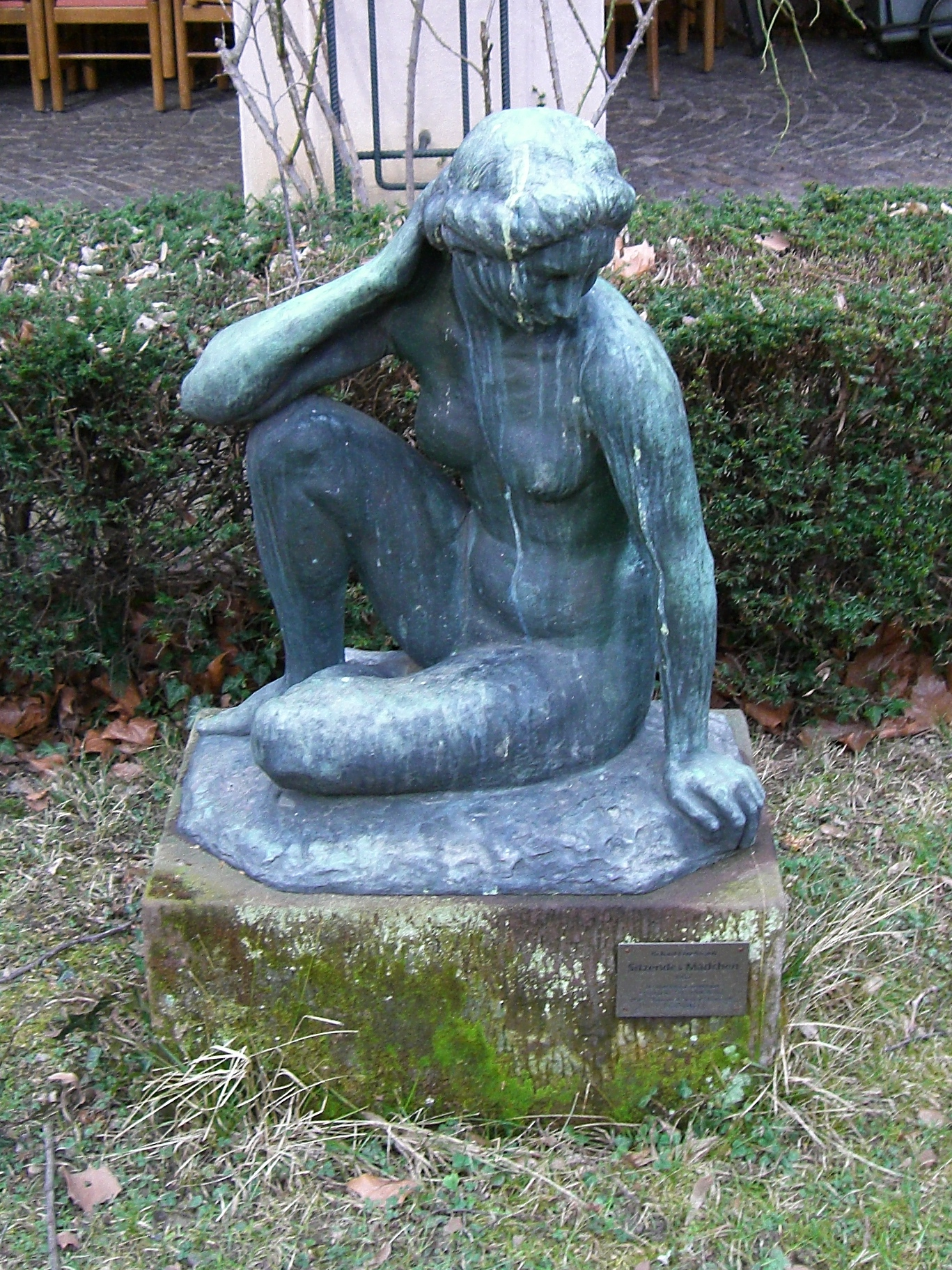 Richard Engelmann 1957: Sitzendes Mädchen